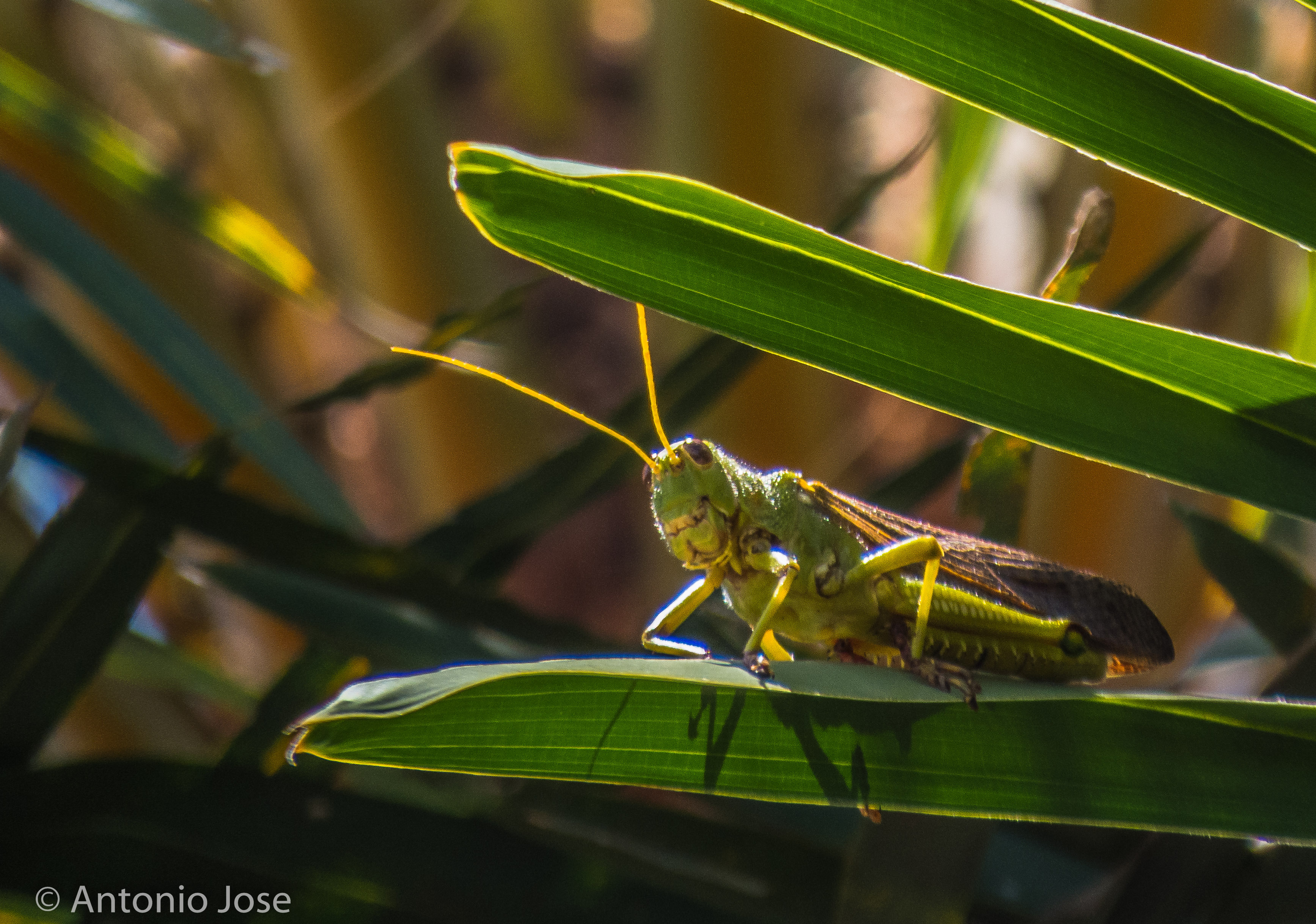 Parque Botânico de Caucaia no Ceará